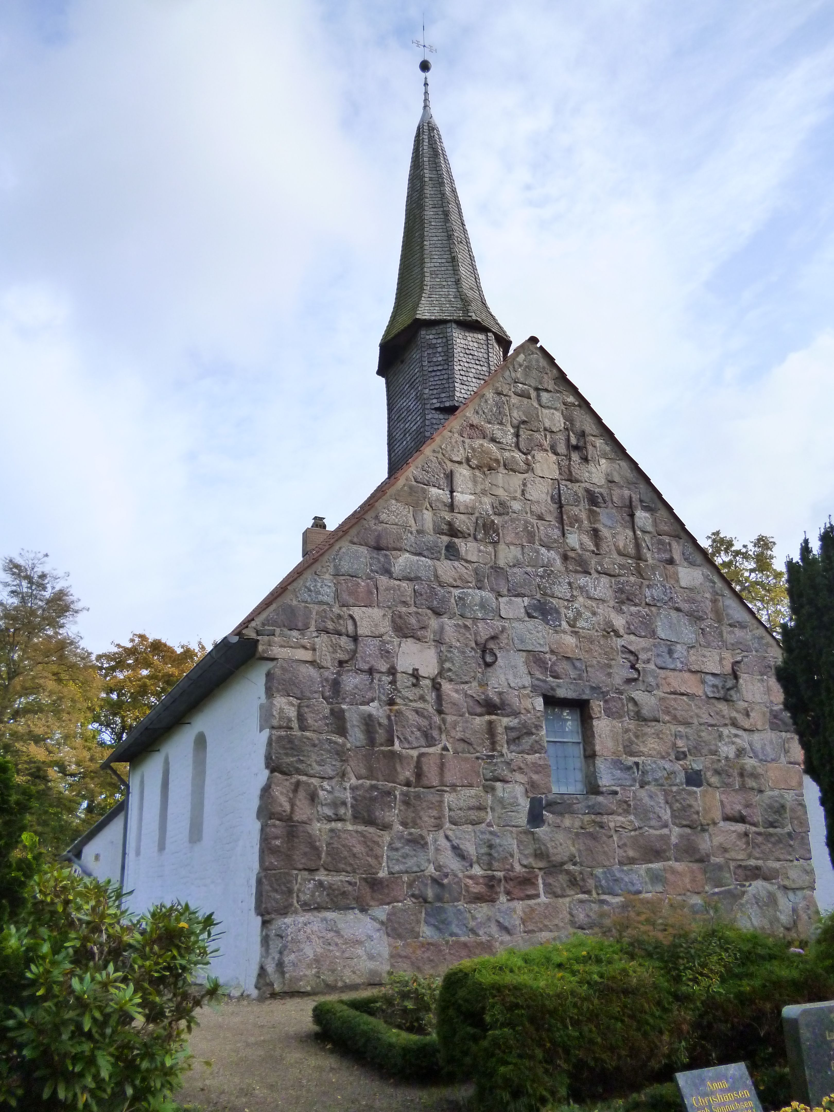 Jakobus-Kirche Uesby, Westfassade aus Feldsteinen